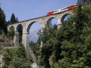 Description: le viaduc Sainte-Marie, dans la vallée de Chamonix, près du village de Servoz, sur la ligne Saint-Gervais-Vallorcine Source: photo prise par Christophe Jacquet en août 2001 Licence: GFDL Christophe Jacquet